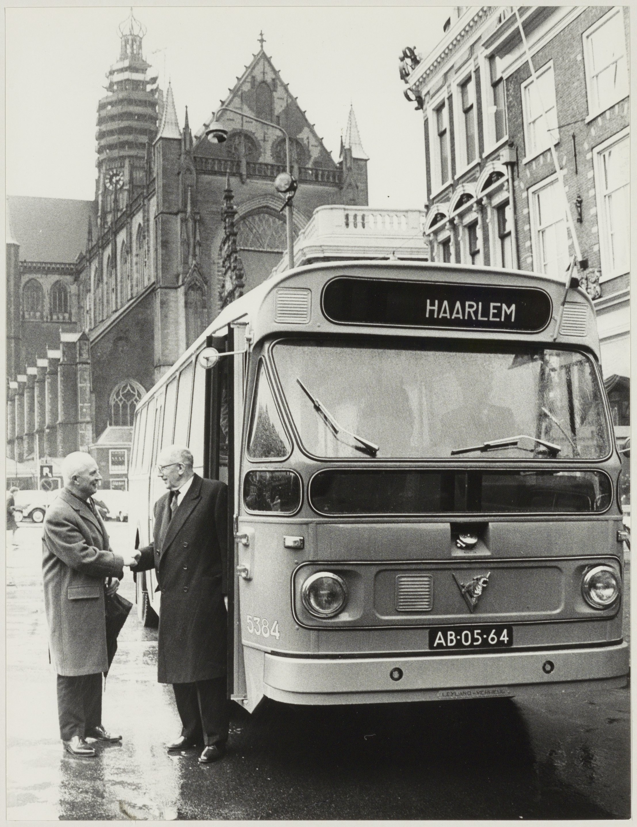 CollectieCollectie Fotoburo de BoerInventarisnummerNL-HlmNHA_54012192BeschrijvingEen autobus van de N.Z.H. op de Grote Markt met links burgemeester Cremers.FotonummerNL-HlmNHA_1478_2620DocumenttypeHistorieprenten, tekeningen en foto'sVervaardigerBoer, Cees de (1918-1985) Soort vervaardigerFotograaf PersonenCremers, Mr. O.P.F.M. Functies personenburgemeester LandNederland ProvincieNoord-Holland GemeenteHaarlem PlaatsHaarlem StraatGrote Markt Begindatum31-03-1966Einddatum31-03-1966TechniekFoto Trefwoordenverkeer en vervoer